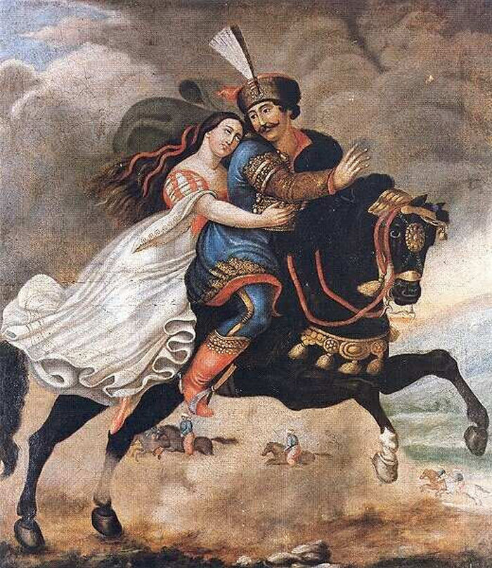 Dobozi Mihály és felesége. Dobozi Mihály a magyarok táborának elestekor kivágta magát és feleségét maga mögé a lovára kapva menekült. Amikor az üldöző csapat már majdnem beérte, a hű asszony könyörgésére, hogy ne kerüljön ellenség kezére, s becsületét mentse, leszúrta feleségét, maga pedig utolsó leheletéig harcolt a török ellen.